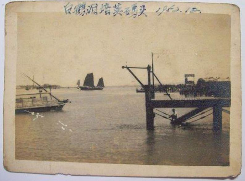 1950年代，廣州市白鶴洞培英碼頭。